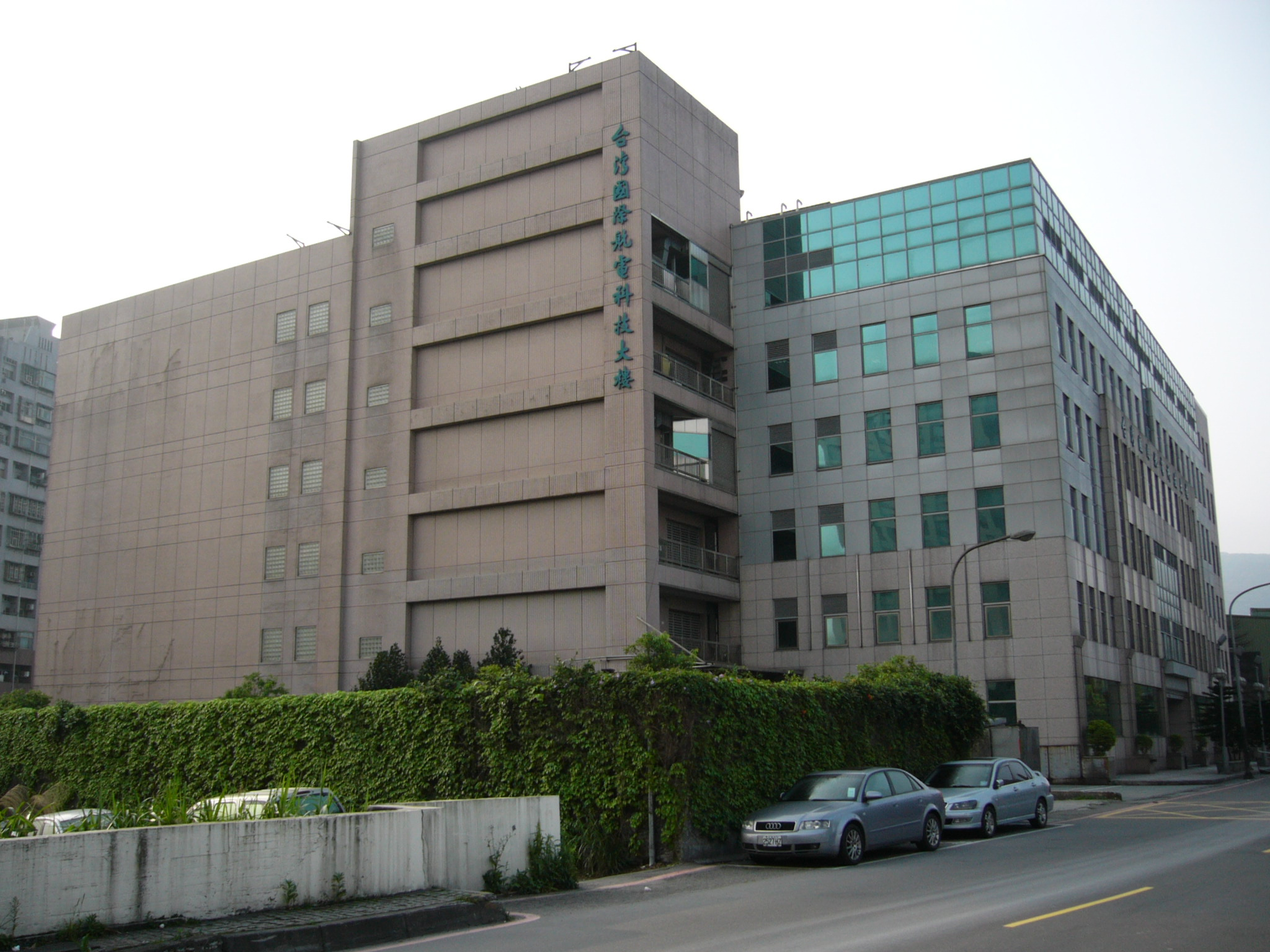 「台灣國際航電科技大樓」左前方外觀，位於臺灣新北市汐止區樟樹二路68號。